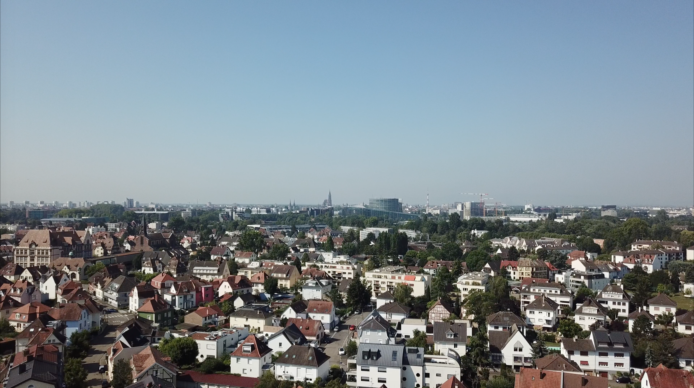 Robertsau vue aéerienne du quartier